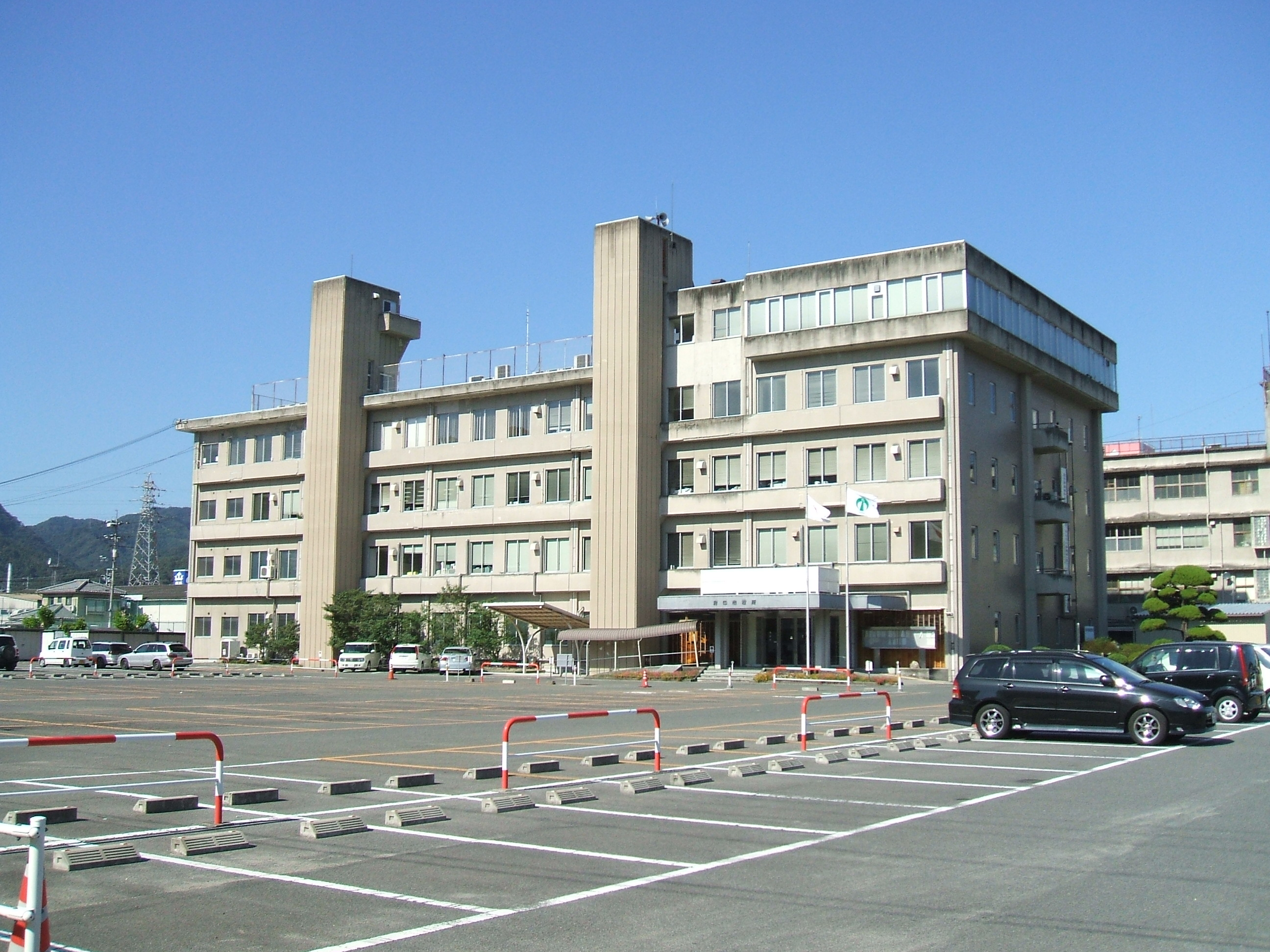 日本国広島県府中市の市役所の庁舎（耐震工事前）